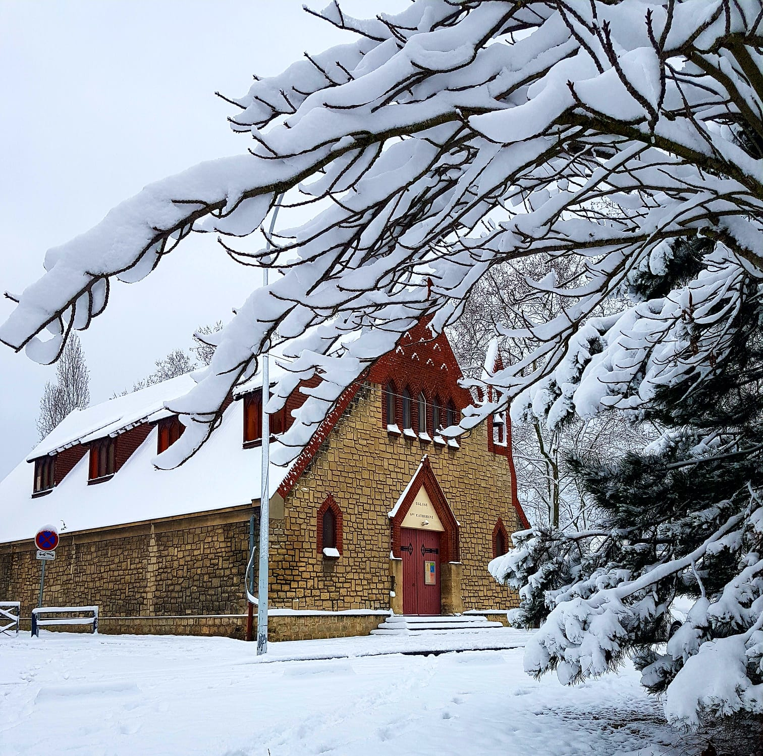 Eglise Sainte Catherine de Sienne sous la neige